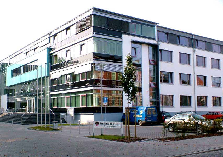 neues Verwaltungsgebäude des Landkreises Wittenberg